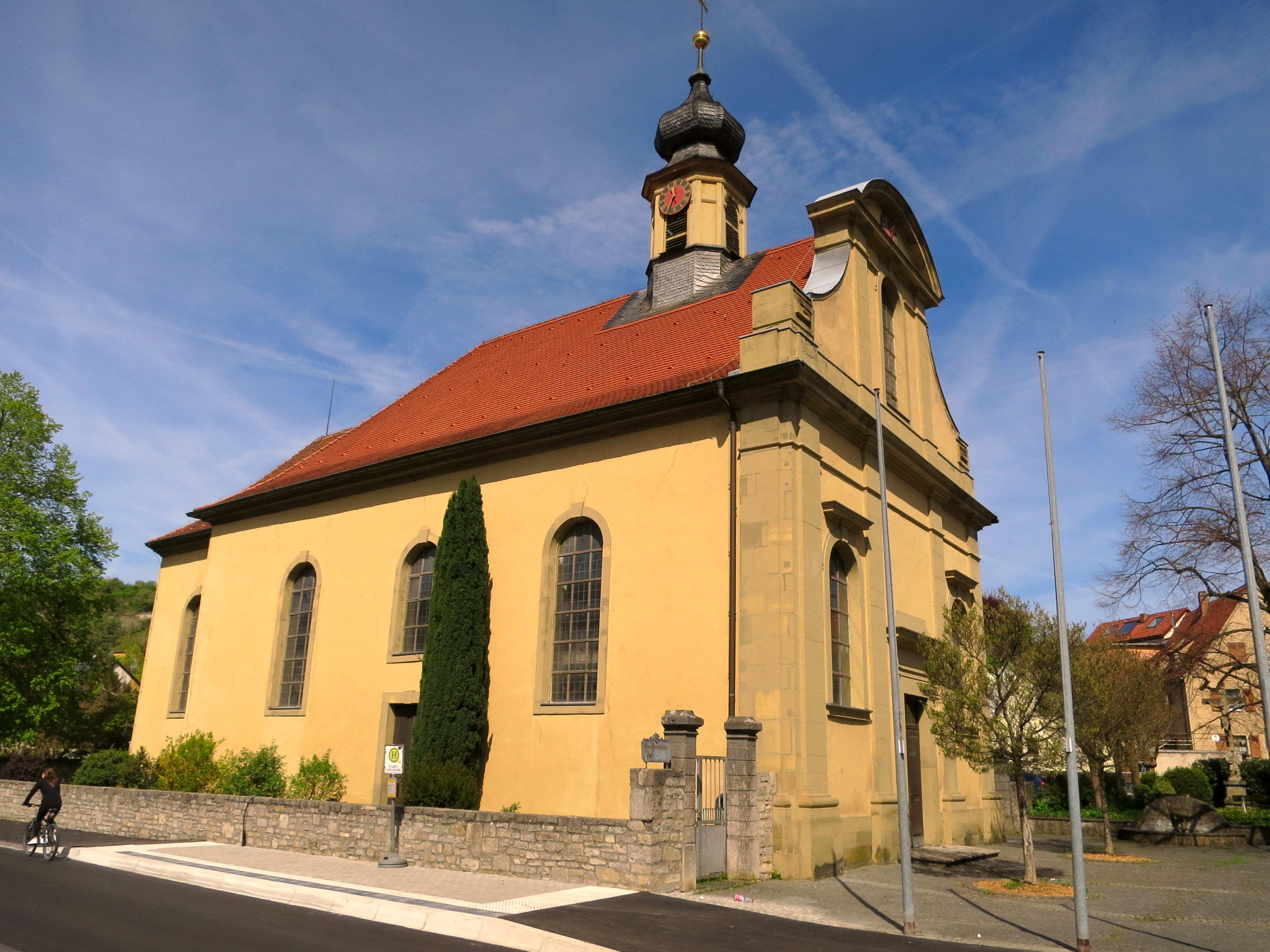 Eine im Jahr 1800 gestiftete Pfarrkirche